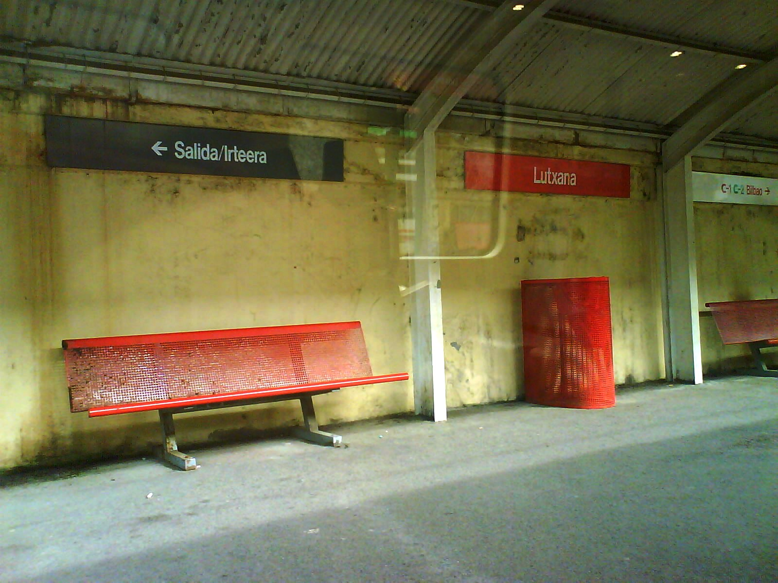 Renfe Aldirikoen Lutxanako geltokia, Barakaldon / Estación de Lutxana de Renfe Cercanías (Barakaldo)